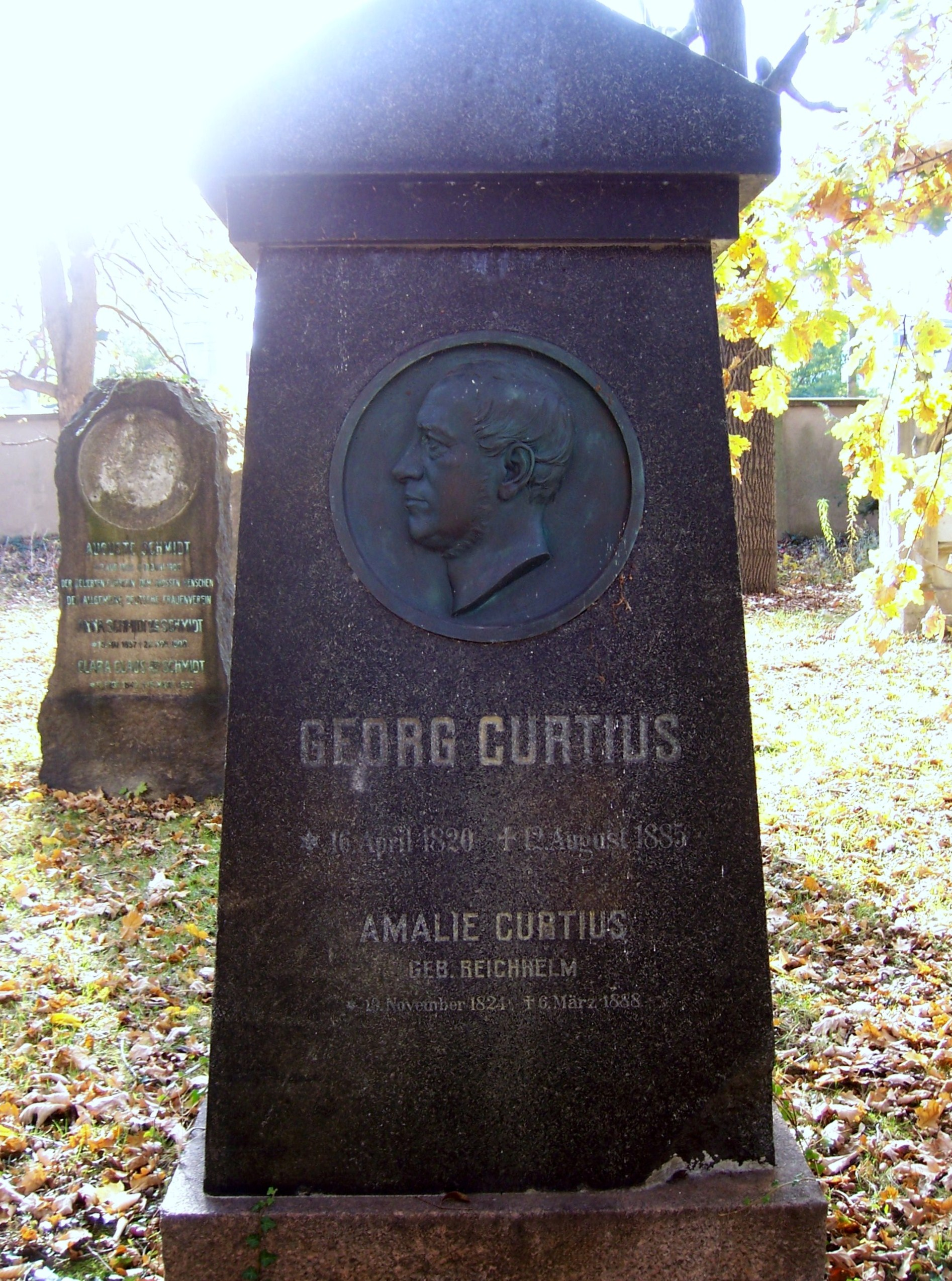 Grabstein Georg Curtius, ursprünglich: Neuer Johannisfriedhof; Heutiger Standort: Lapidarium Alter Johannisfriedhof, Bronzemedaillon: Werner Stein